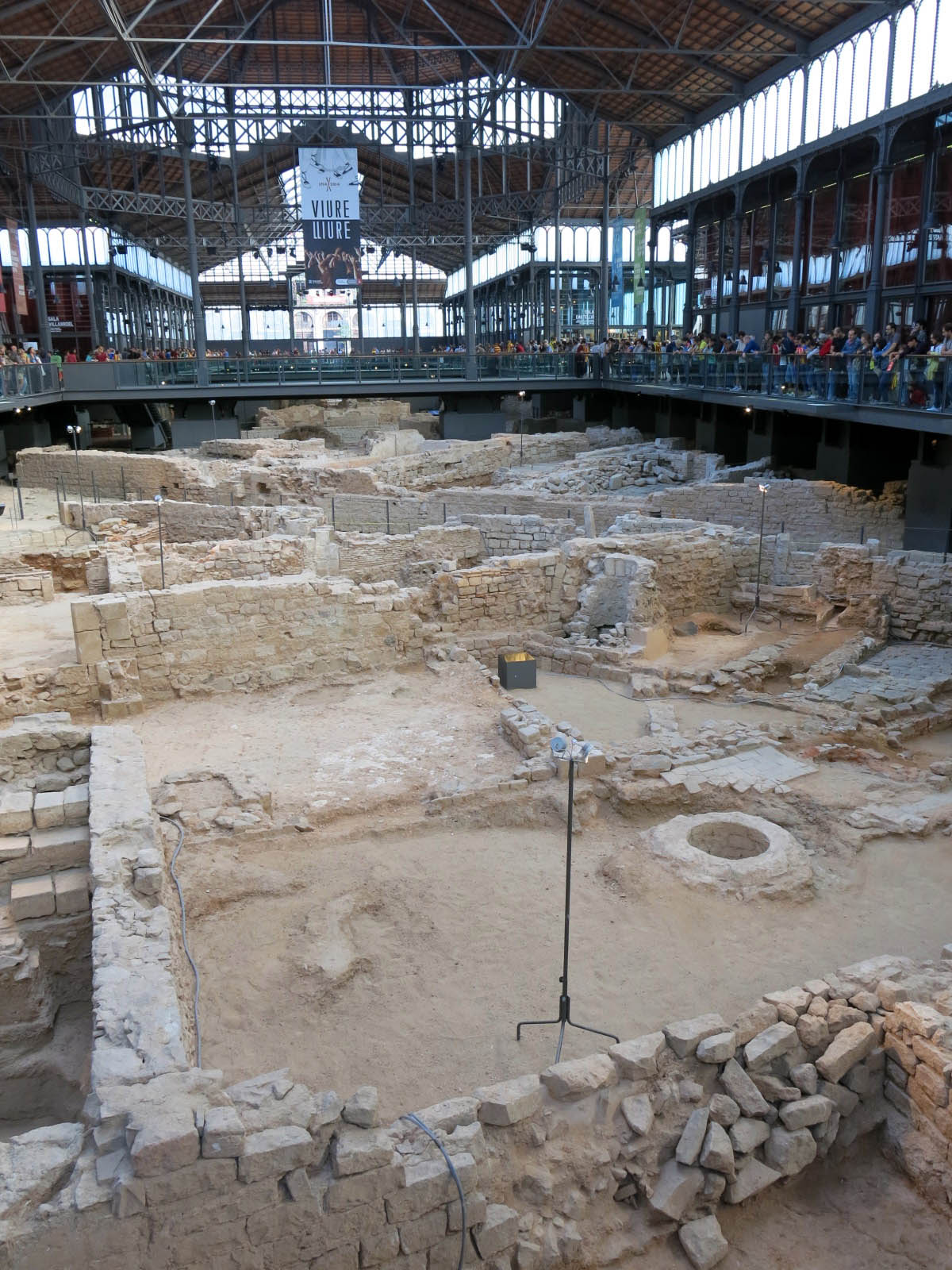 Mercat del Born (Barcelona). Casa Corrales (N.3), al carrer dels Corders de Viola Object location41° 23′ 08.76″ N, 2° 11′ 01.54″ E